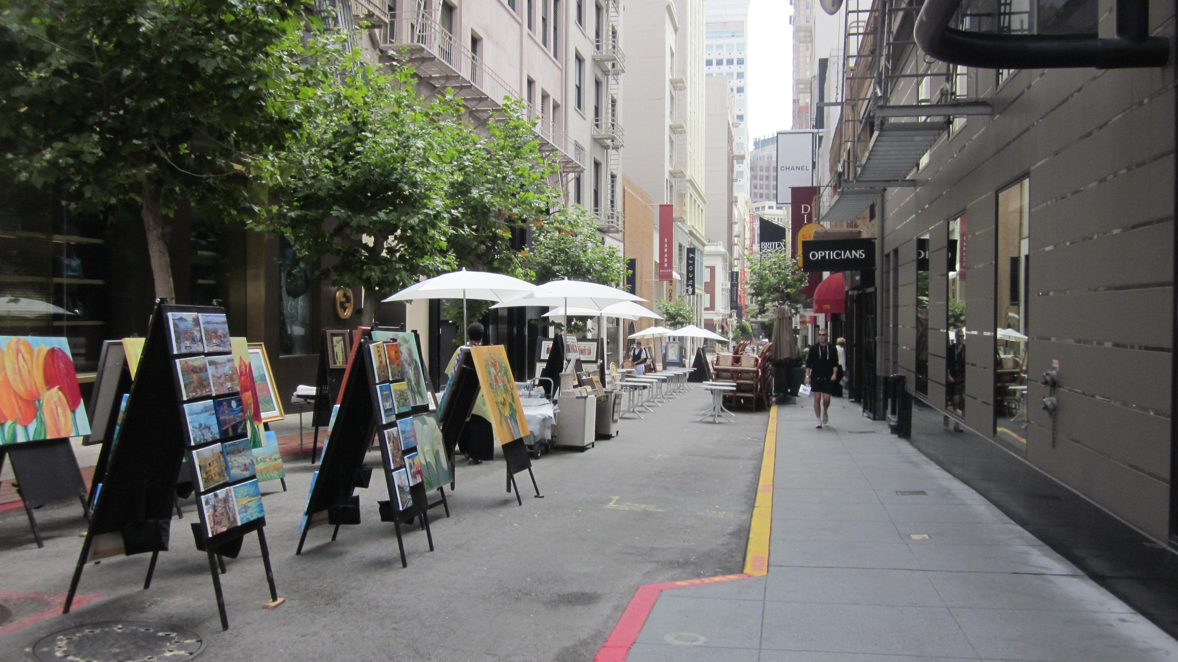 Maiden Lane in San Francisco, California.